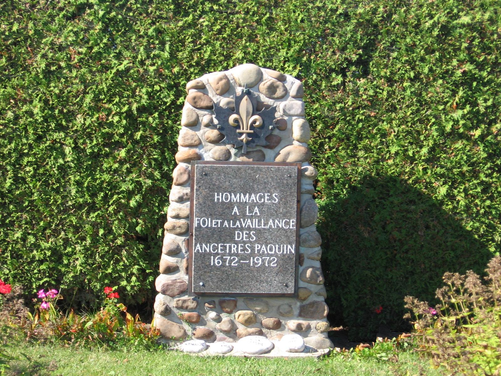 Monument dédié aux familles Paquins